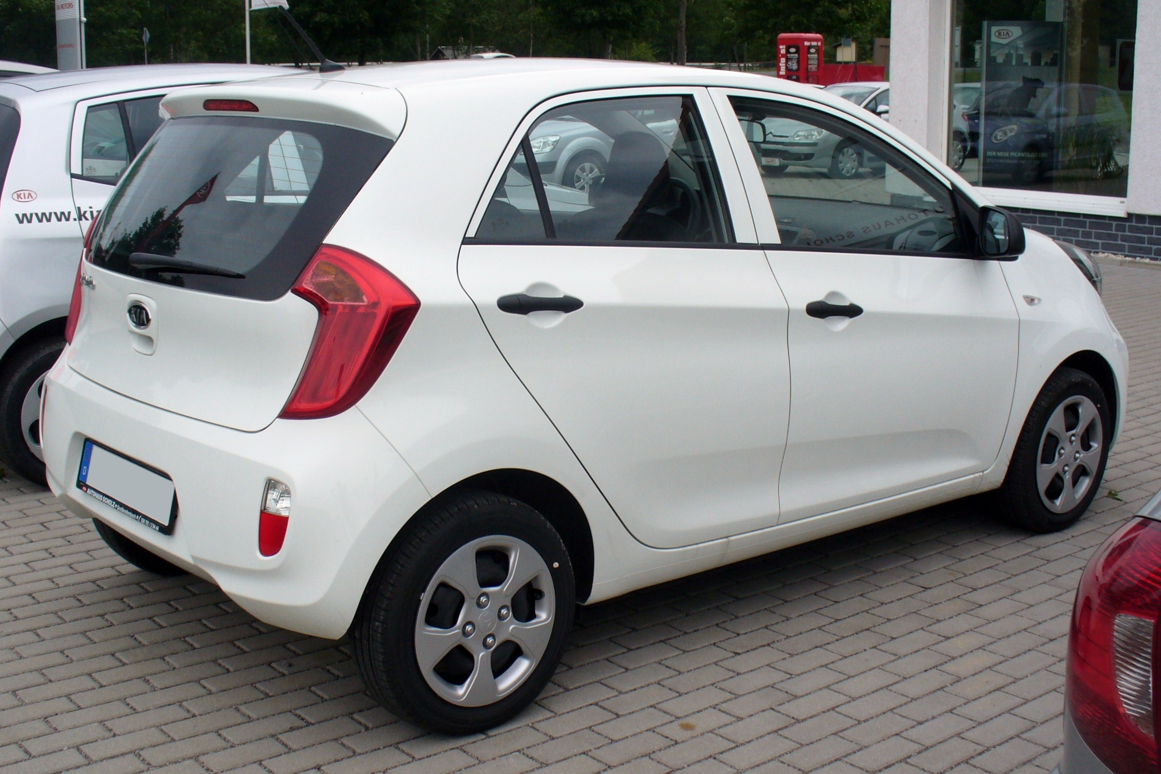 Kia Picanto